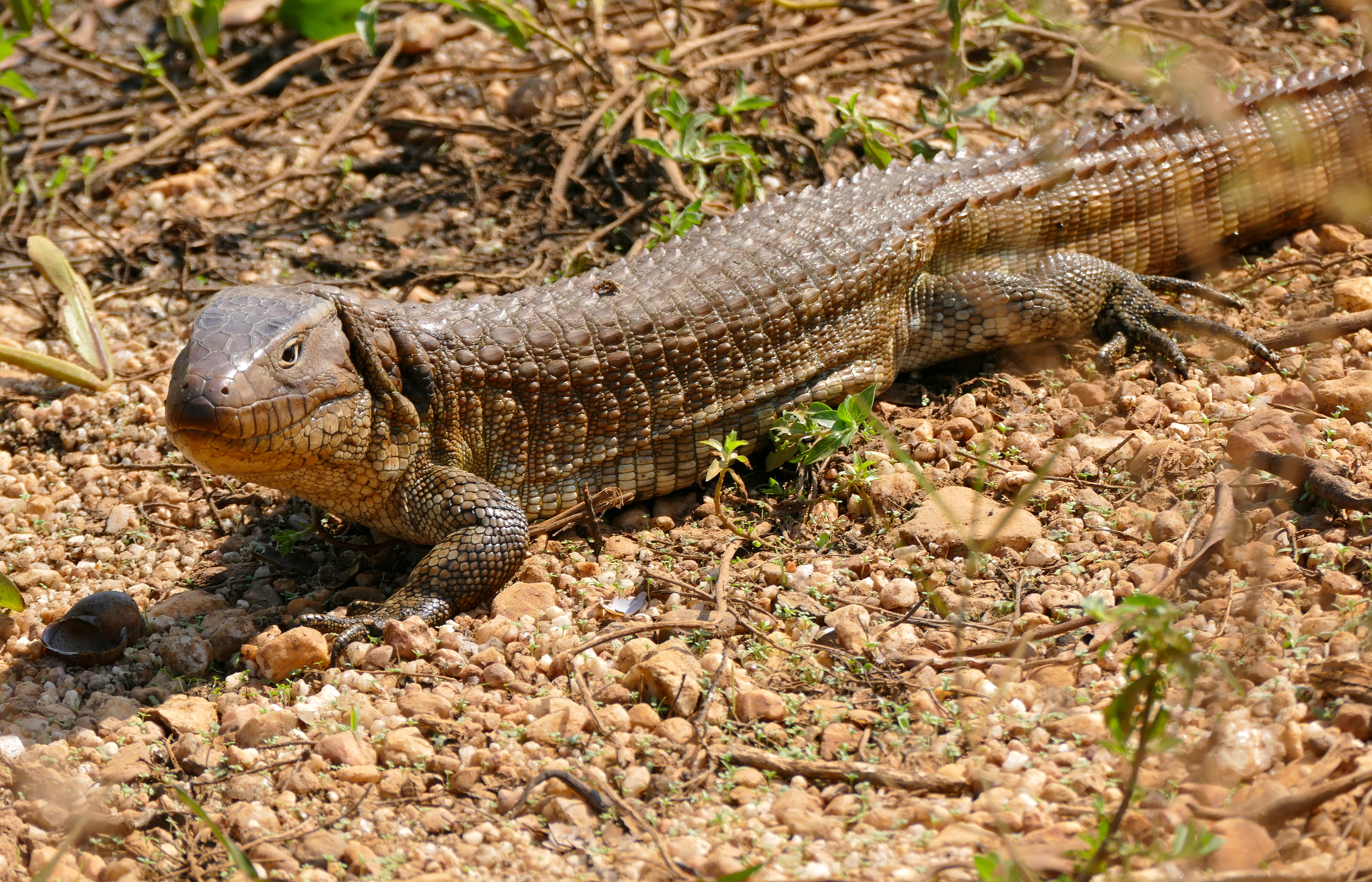 Transpantaneira, Poconé, Mato Grosso, BRAZIL